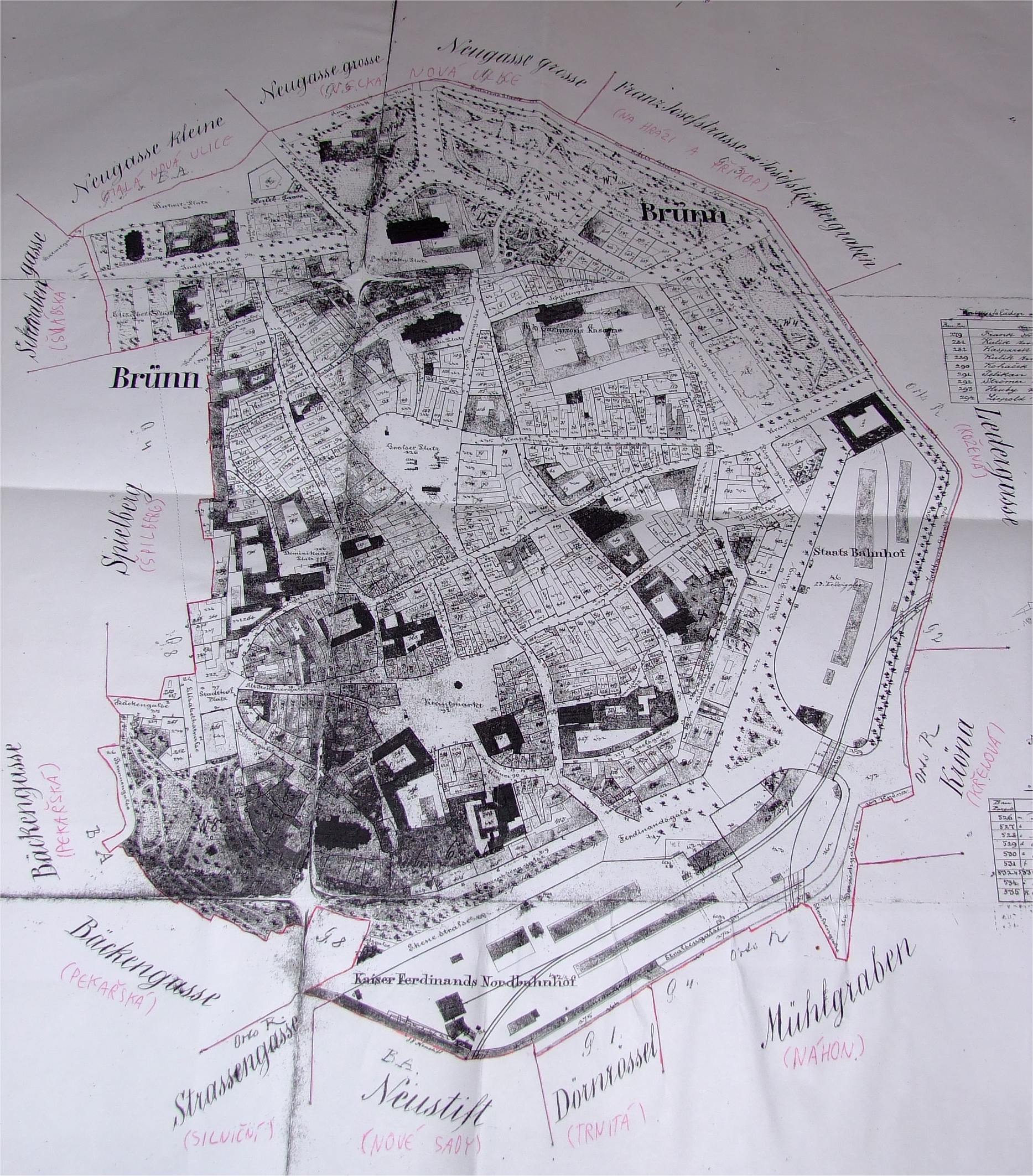 Černobílá fotokopie katastrální mapy (indikační skici) katastrálního území Město Brno z roku 1876